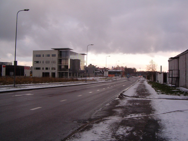 Laki I kvartal (Kadaka asum). Kvartalisisene Tammsaare teega paralleelne tänav. Tallinn